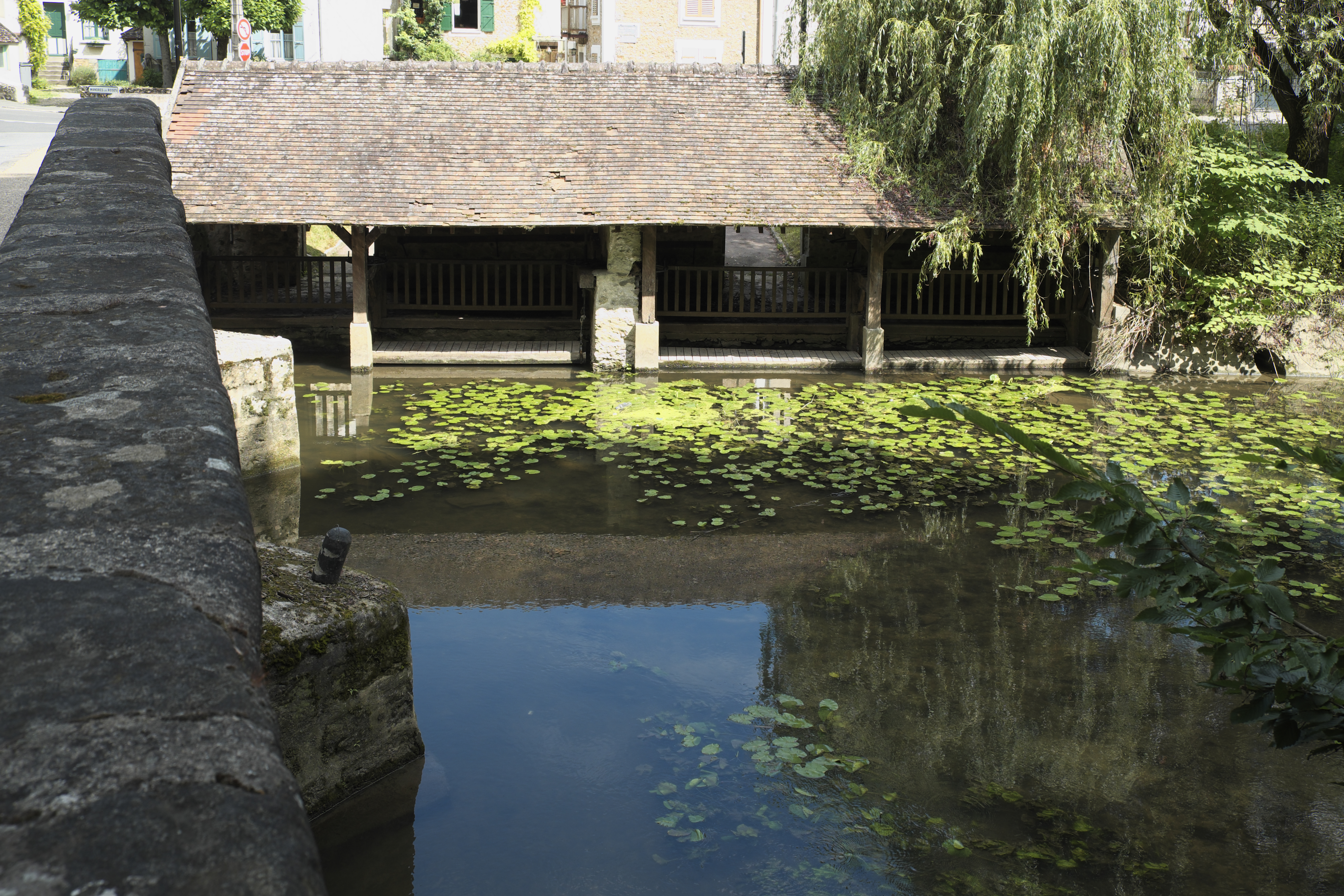 Waschhaus (lavoir) in Boussy-Saint-Antoine im Département Essonne (Île-de-France/Frankreich)